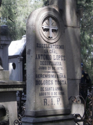 imagen tomada por mi a la tumba de antonio lopez